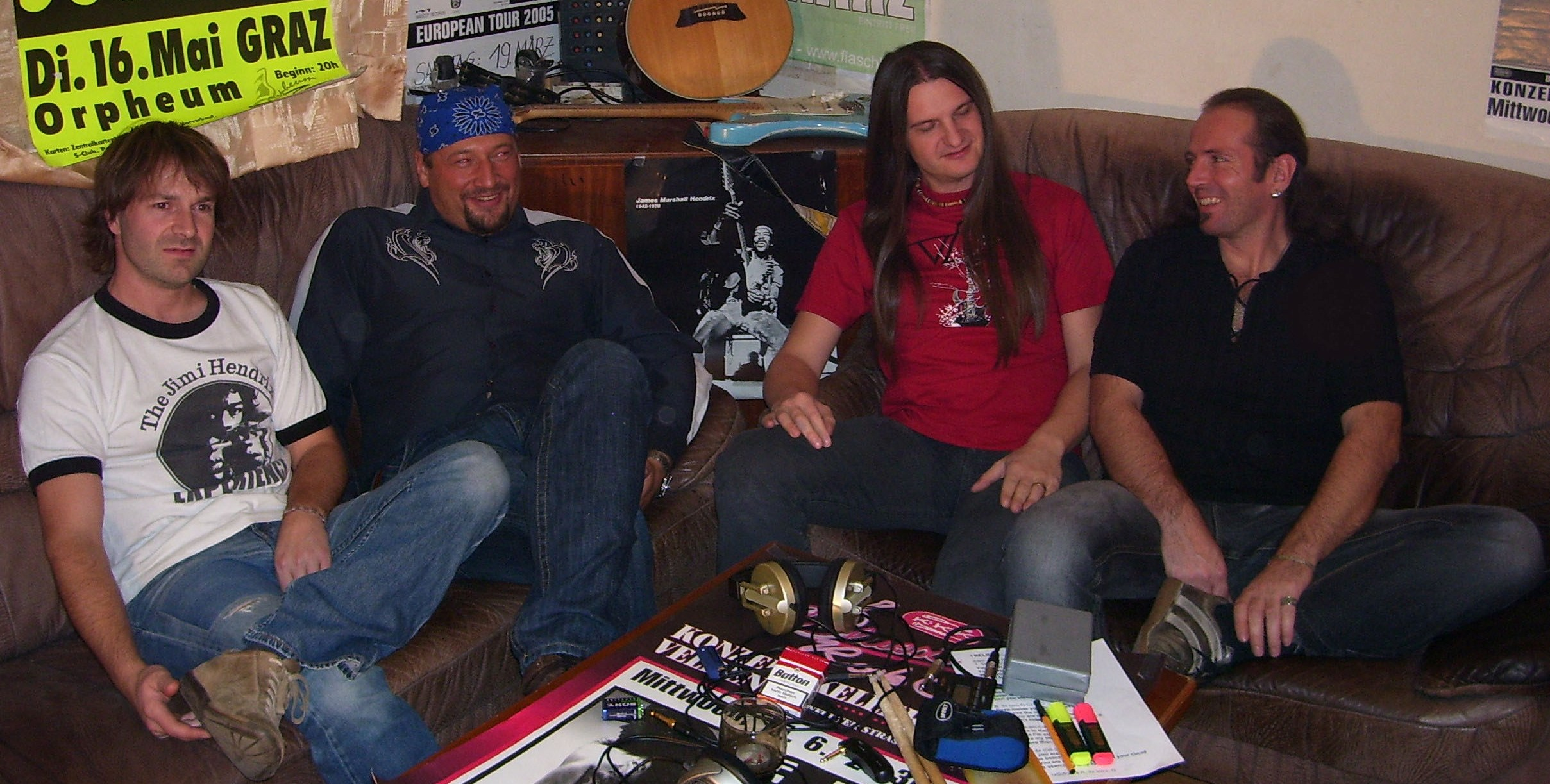 Jam Trax 2006